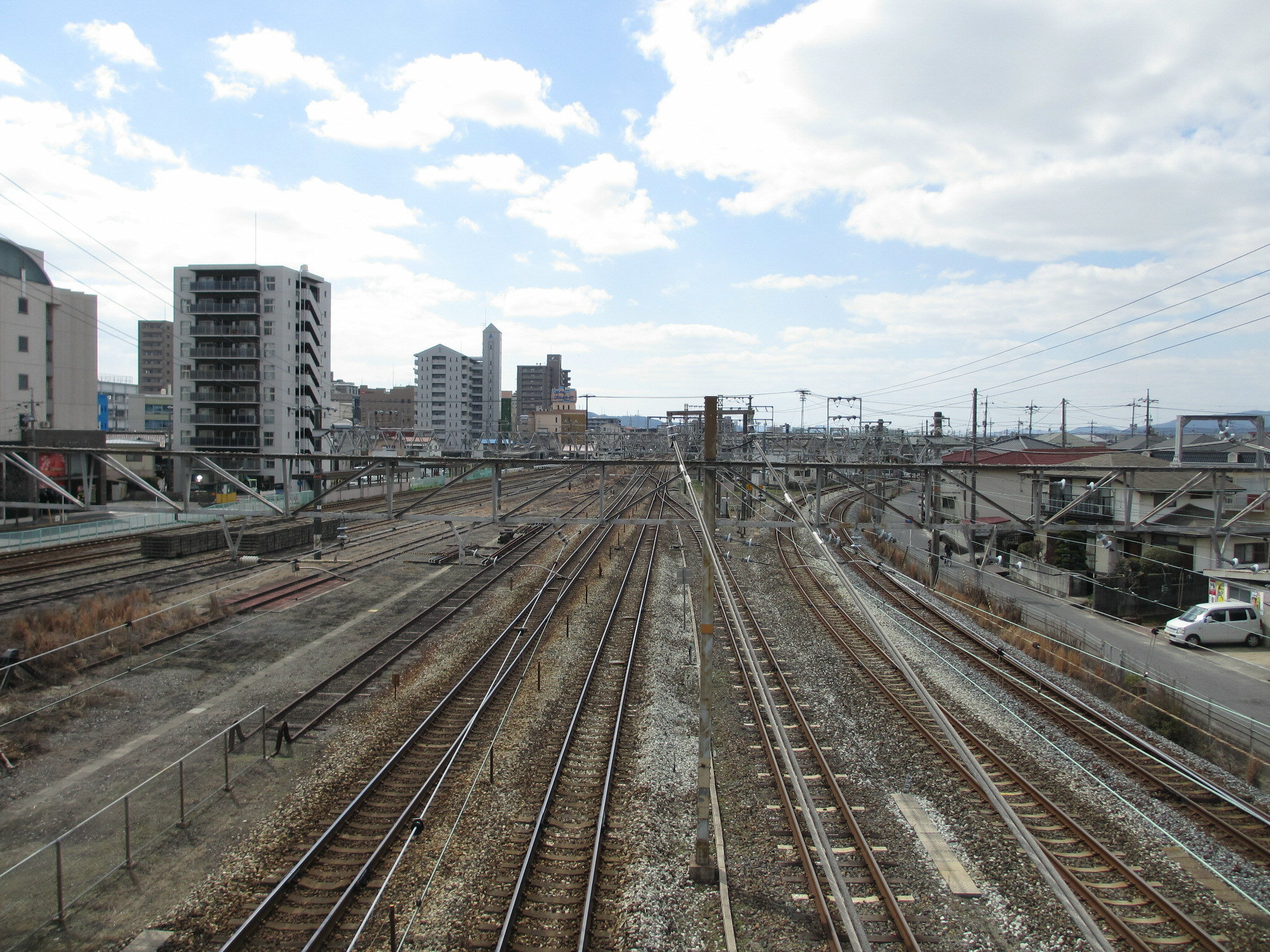 Kawanishimachi